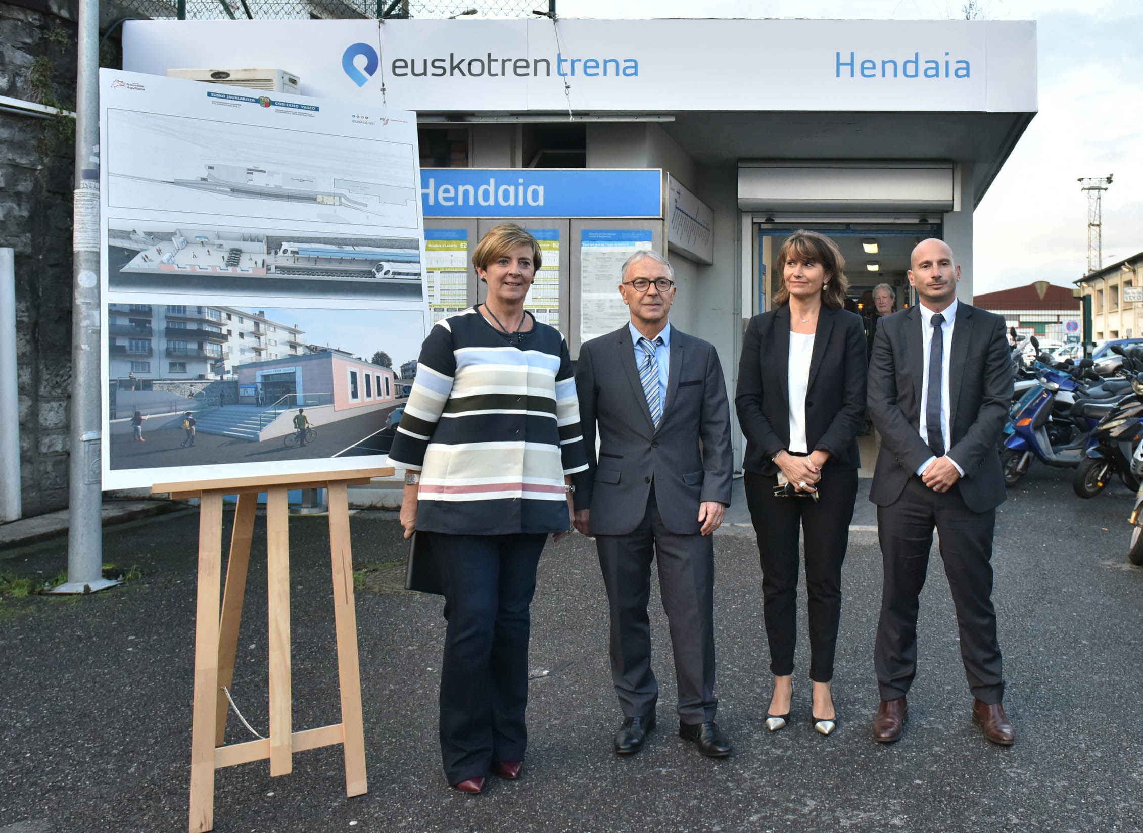 Presentación del anuncio de la remodelación de la estación de Euskotren en Hendaia